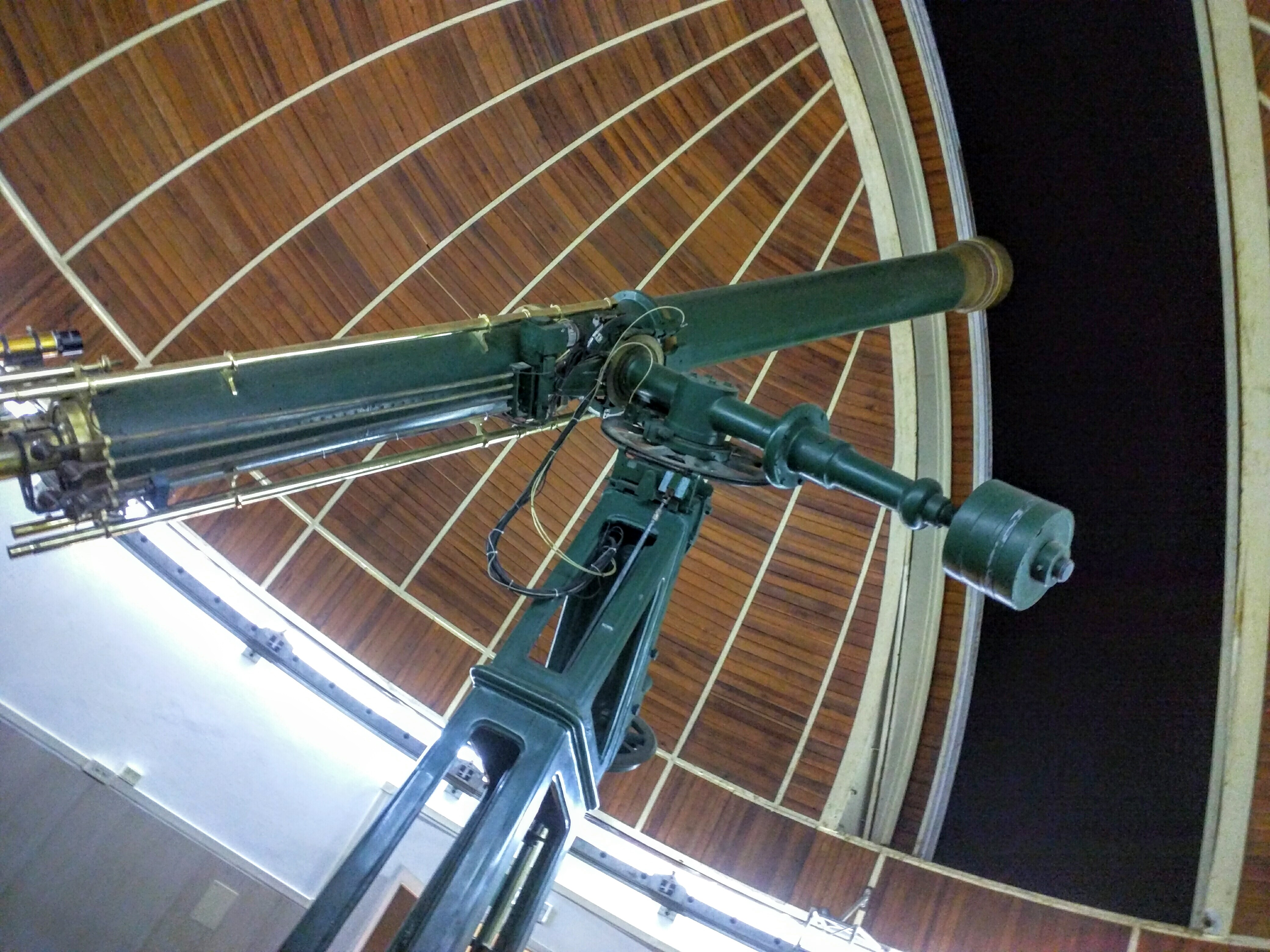 Arcetri, telescopio